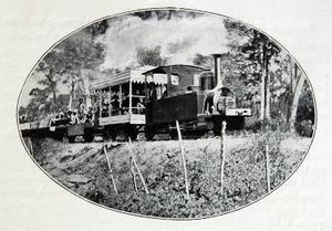 Probablement la locomotive 'Paul Doumer'